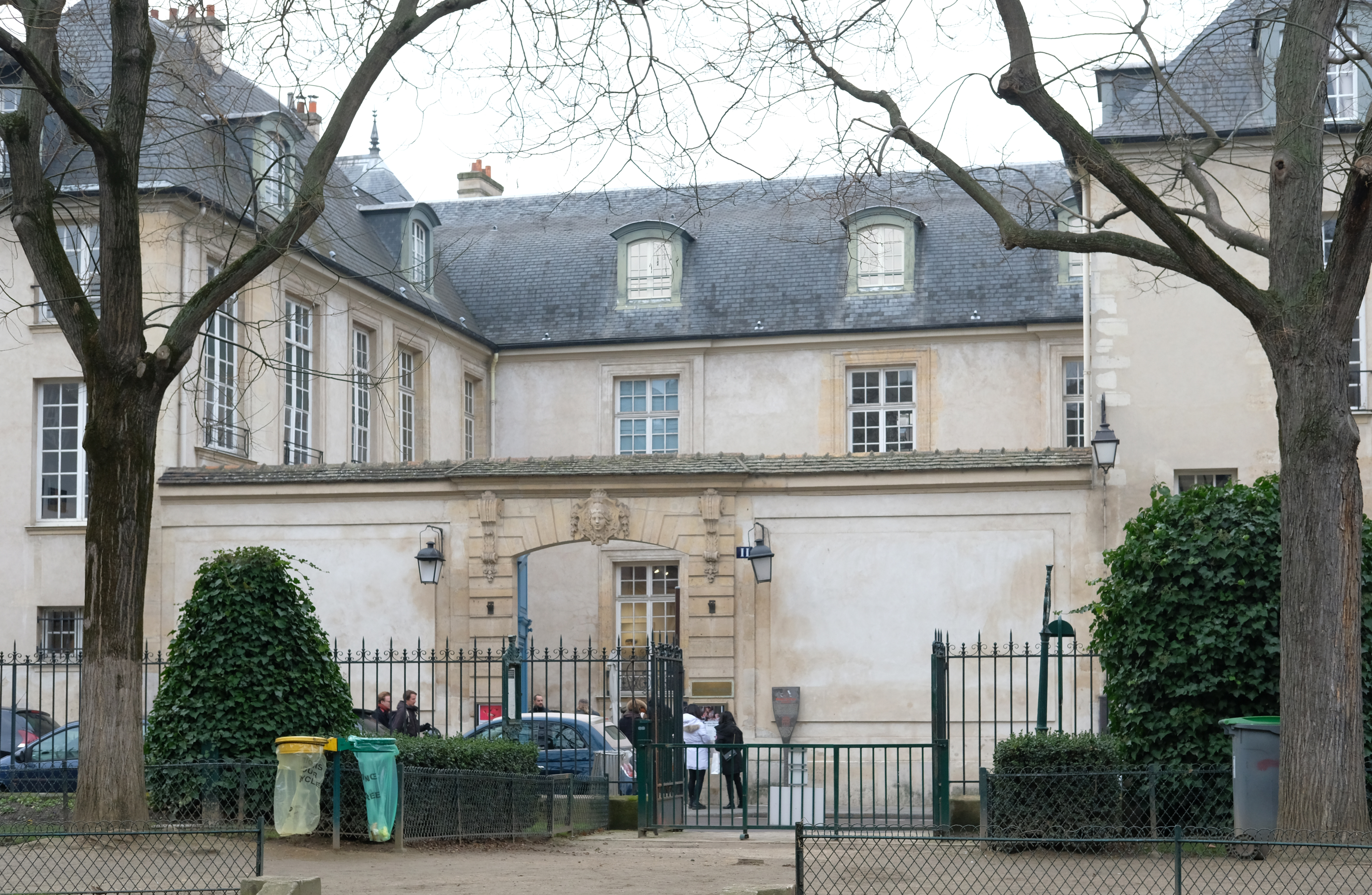 Rue Payenne (n°11, hôtel de Marle) - Paris III